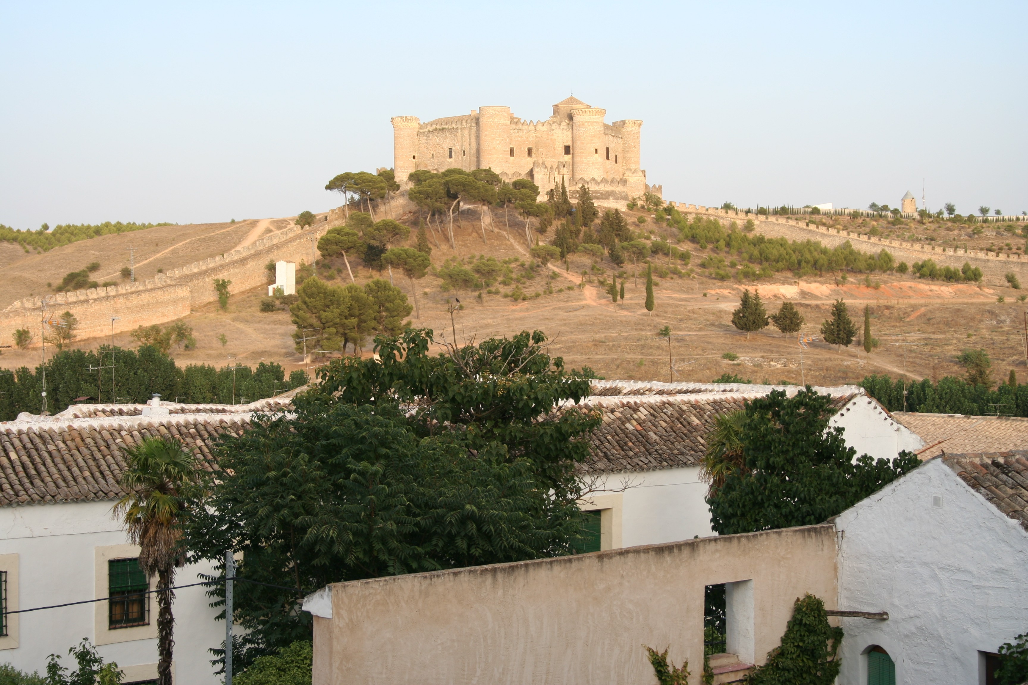 Le castillo de Belmonte (Cuenca, España) visto desde la esplanada de La Colegiata